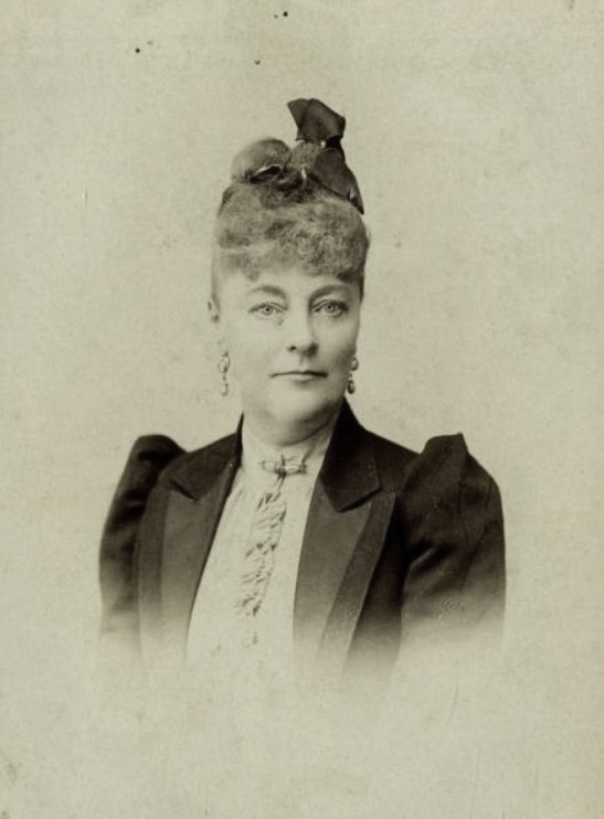 Мария Фердинандовна Набокова, ур. баронесса Корф (1842—1926)